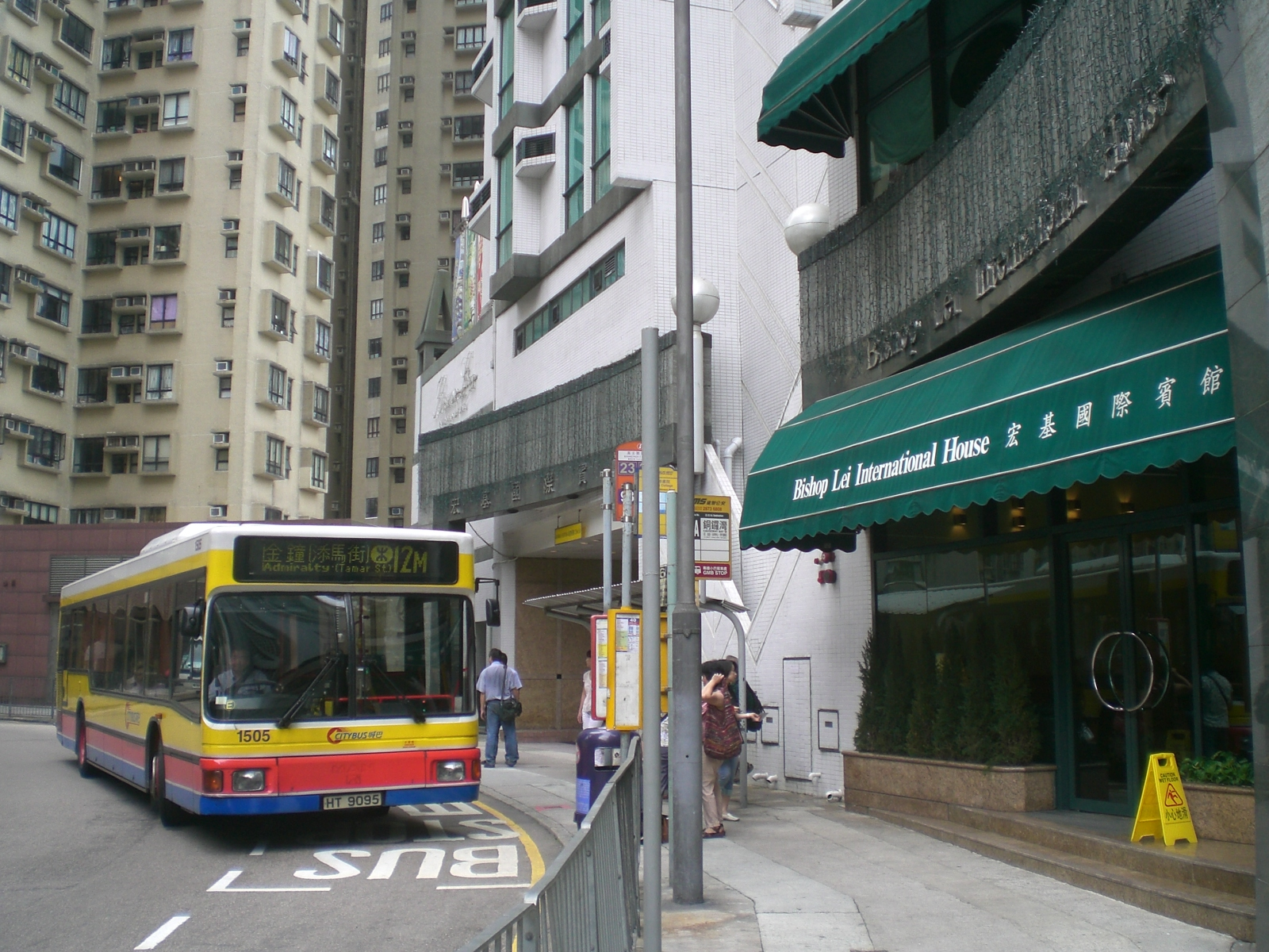 香港半山區羅便臣道，宏基國際賓館